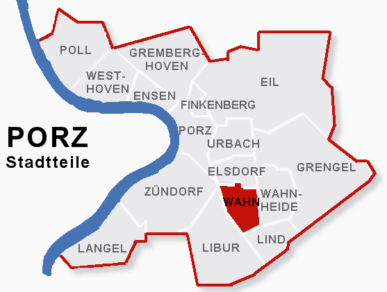 Lage des Stadtteils Wahn im Stadtbezik Porz